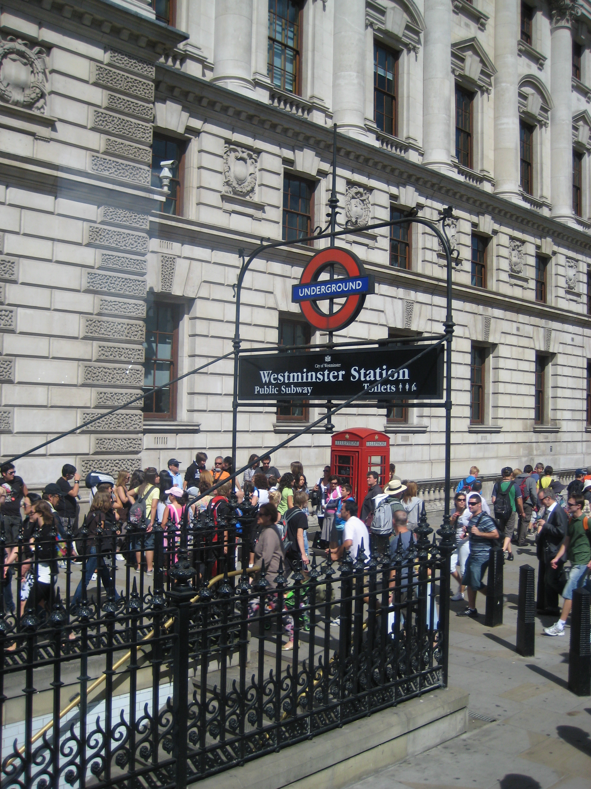 ロンドン地下鉄・ウェストミンスター駅の入り口の1つ。